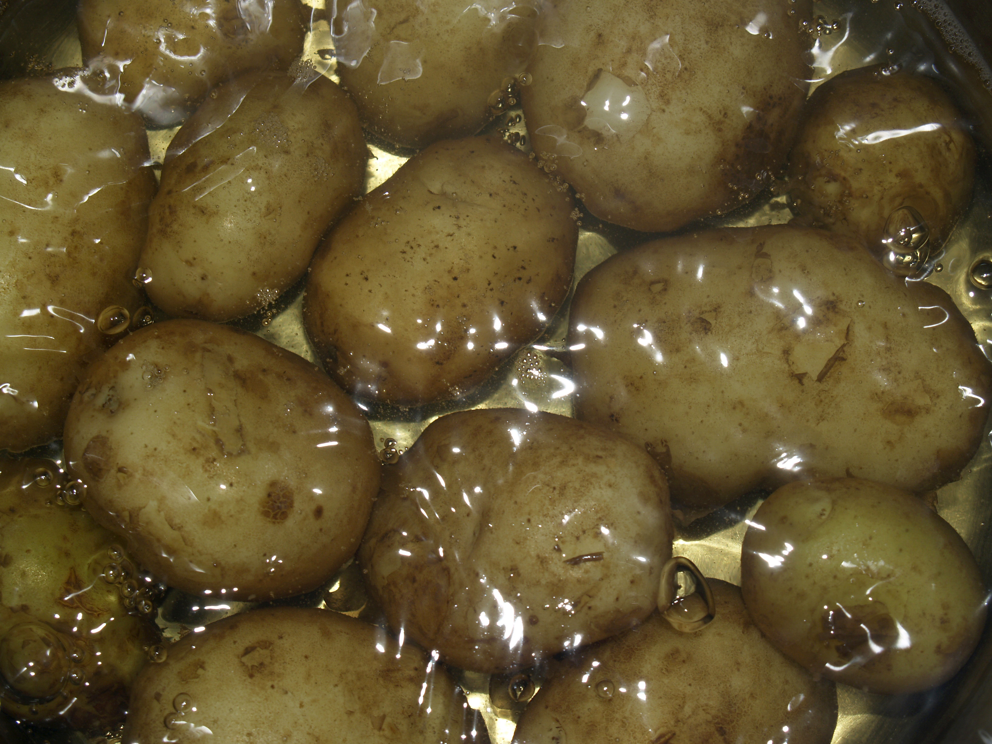 Nye kartofler